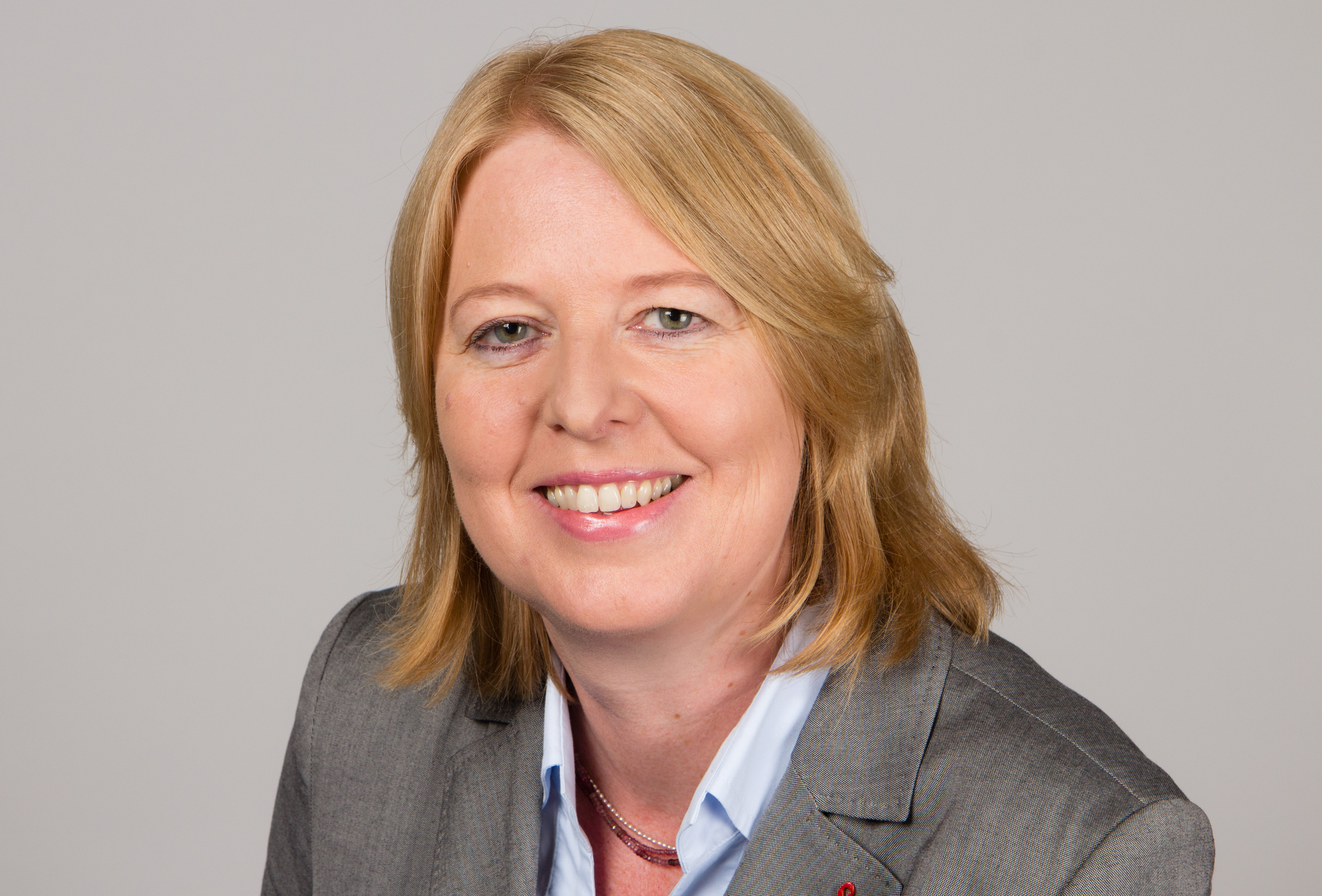 Bärbel Bas (* 3. Mai 1968 in Duisburg-Walsum) ist eine deutsche Politikerin (SPD) aus Duisburg. Seit dem 19. Dezember 2013 ist sie Parlamentarische Geschäftsführerin der SPD-Bundestagsfraktion. Wikipedia-Bundestagsprojekt 2014 8–12 September 2014 in BerlinThis file was taken during the project “Wiki loves parliaments/Bundestag 2014” (German). Organisation: Martin Rulsch, Olaf KosinskyDesign: Martin KraftPhotography: Foto-AG Gymnasium Melle (Jan-Kristof Blömke, Lukas Eismann, Moritz Kosinsky, Laura Lessing, Karsten Mosebach, Mascha Mosebach, Teresa Schreer, Noah Sewöster, Niklas Tschöpe), Olaf Kosinsky, Martin Kraft, Harald Krichel, Steffen Prößdorf, Ralf Roletschek, Martin Rulsch, Gerd Seidel, Sven TeschkeVideo: Marc Rudnick, Manuel SchneiderEditors: Marcus Cyron, Günter Fremuth, Martin Kraft, Robin Krahl, Harald Krichel, Martin Rulsch, WikiAnikaReception: DasMonstaaa, Leonie Rabea Große, Lutheraner, Nina Möllering, Martin Rulsch, WikiAnika, Foto-AG Gymnasium MelleCosmetics: Regina Bosak, Bettina Dieguez, Sandra Kobbe, Andrea Strehlke; Irada Abdullayeva, Vivien Abelmann, Olena Engelbrecht, Sarah Fabini, Nina Magnus, Jacqueline Schmidt, Leonie Taboada, Julia Willer Usage information If you need more information how to use this file, please send an email to . Personality rights warningAlthough this work is freely licensed or in the public domain, the person(s) shown may have rights that legally restrict certain re-uses unless those depicted consent to such uses. In these cases, a model release or other evidence of consent could protect you from infringement claims.